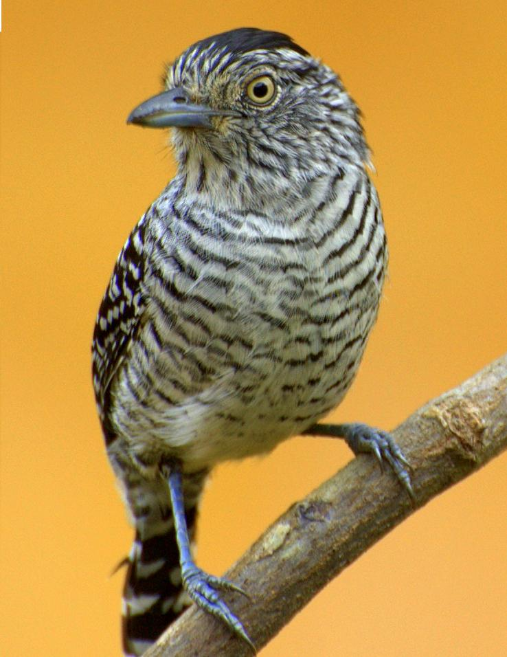 Piraju-SP - Brasil